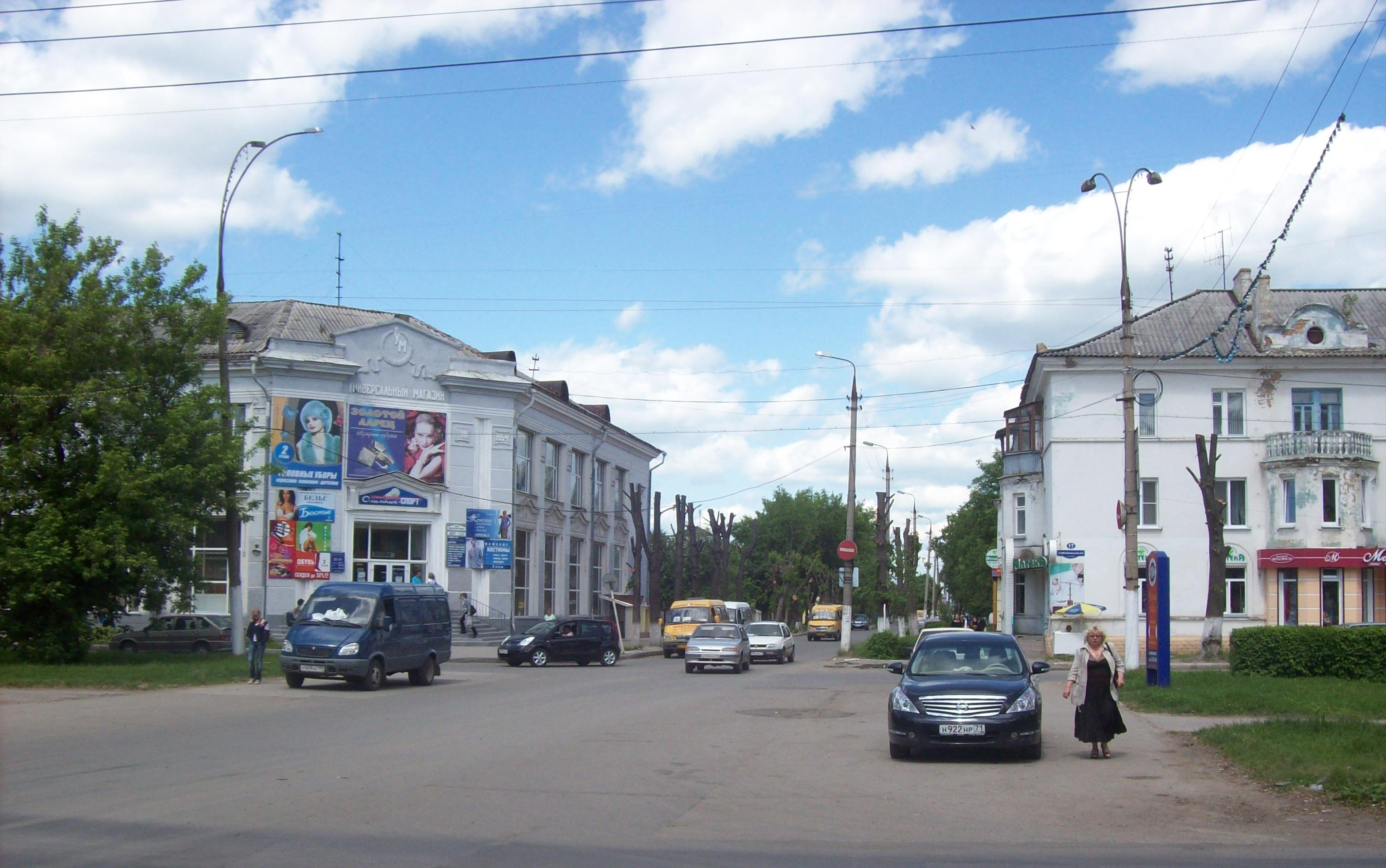 Тульская область. г.Новомосковск. Перекрёсток улицы Берёзовая и улицы Комсомольской.